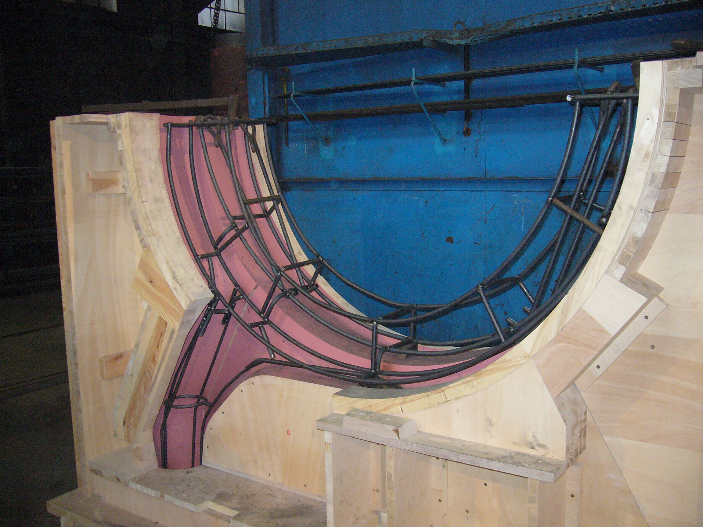 Kerneisen im Kernkasten